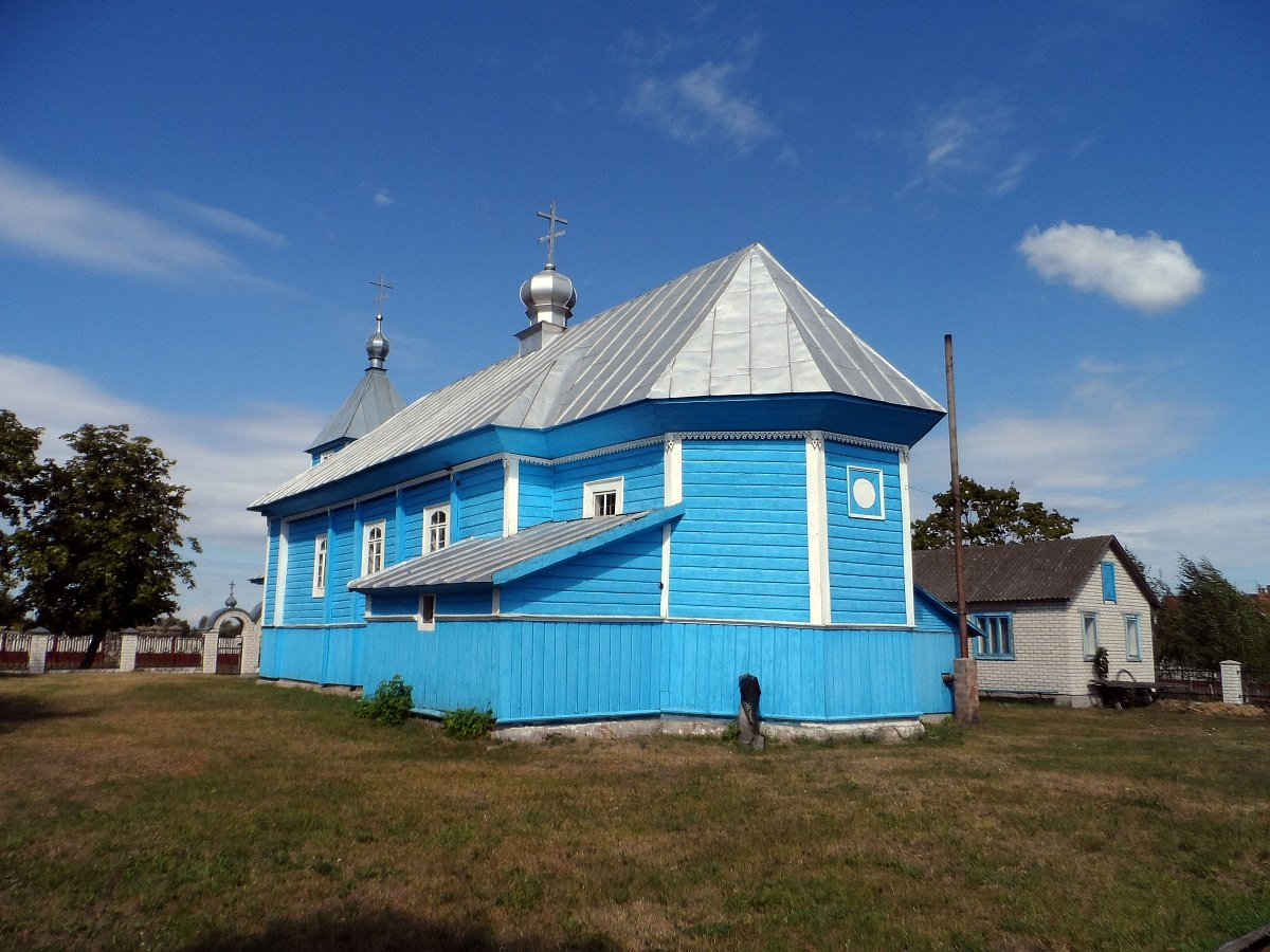 Новая Папіна. Спаса-Праабражэнская царква